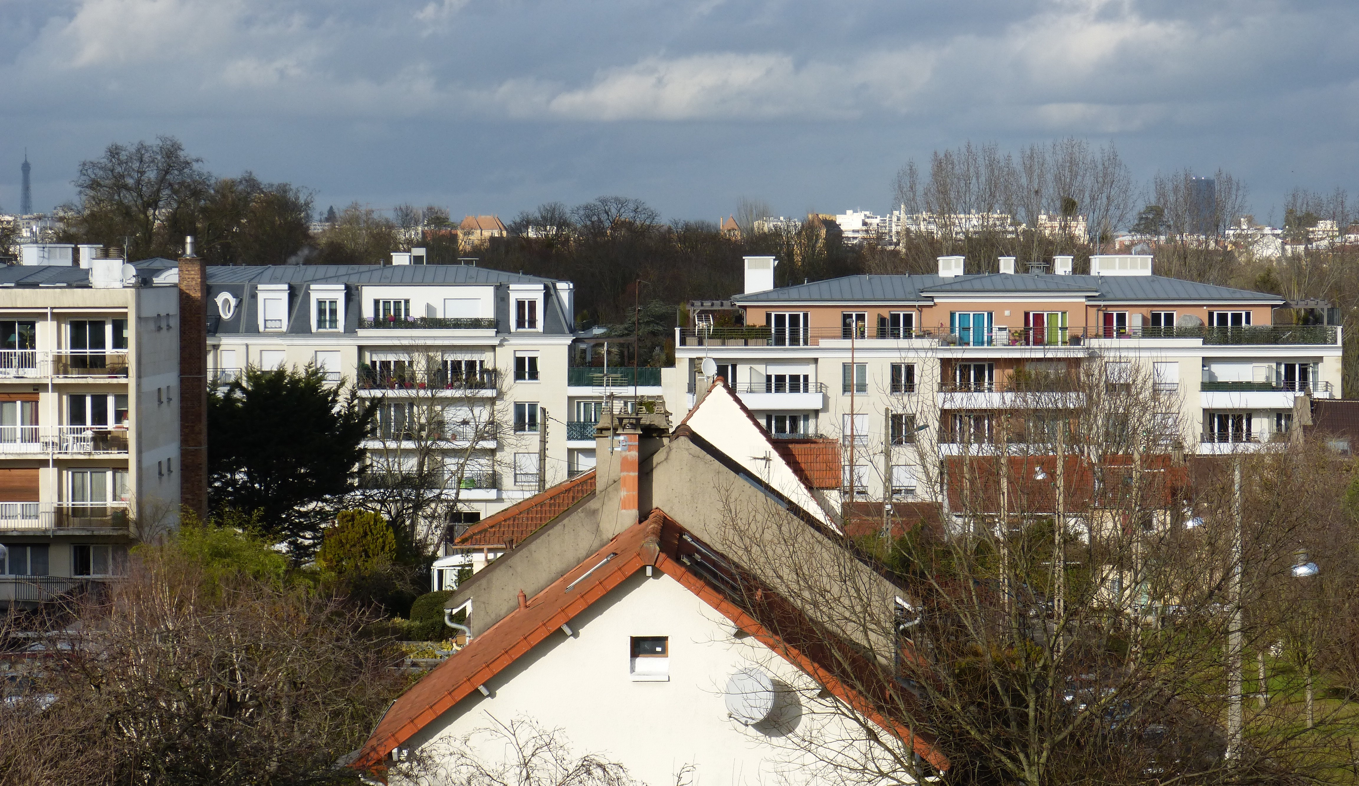 Villa Angela 1 et 2 à Châtenay-Malabry